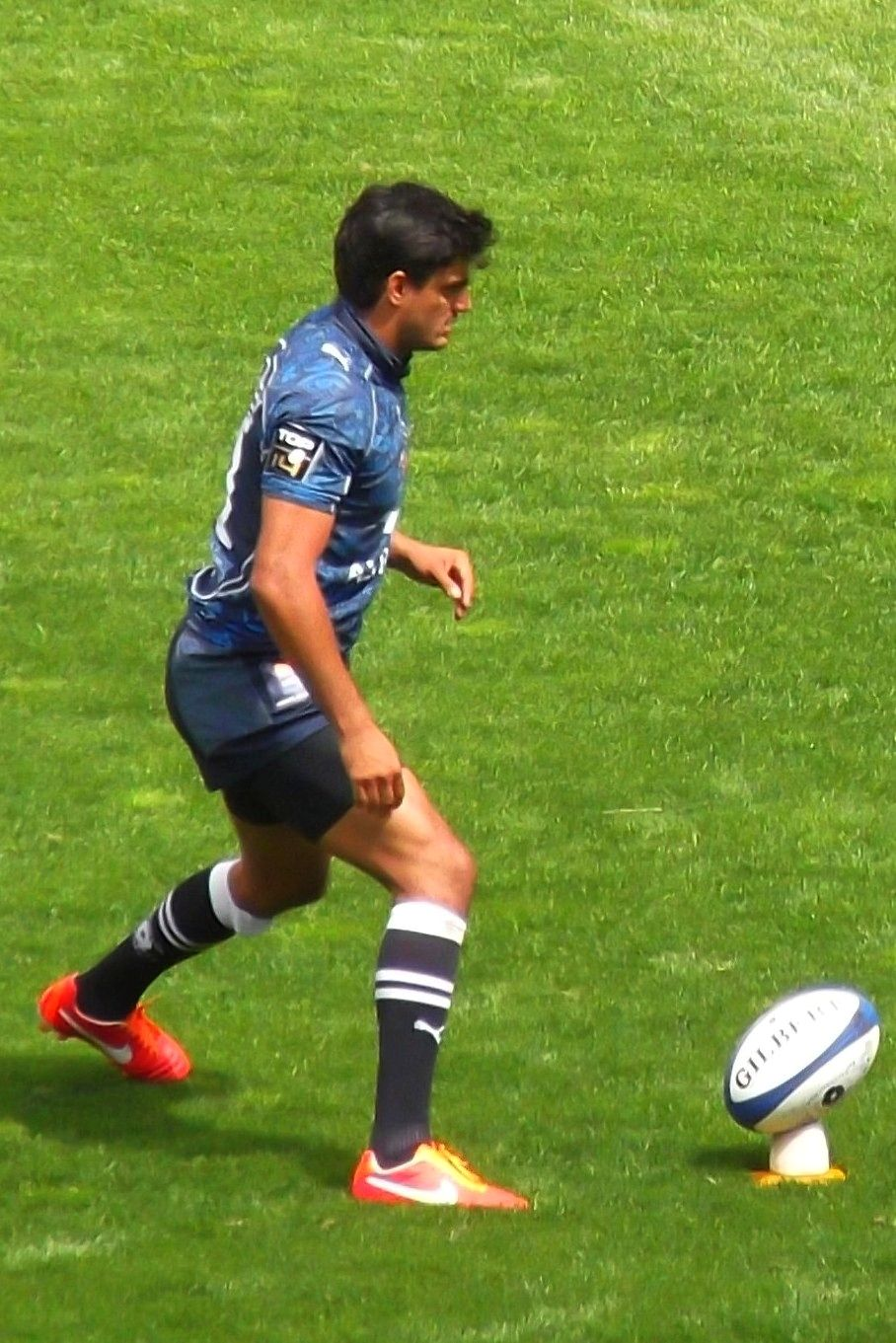 Bustos Moyanos (2013).